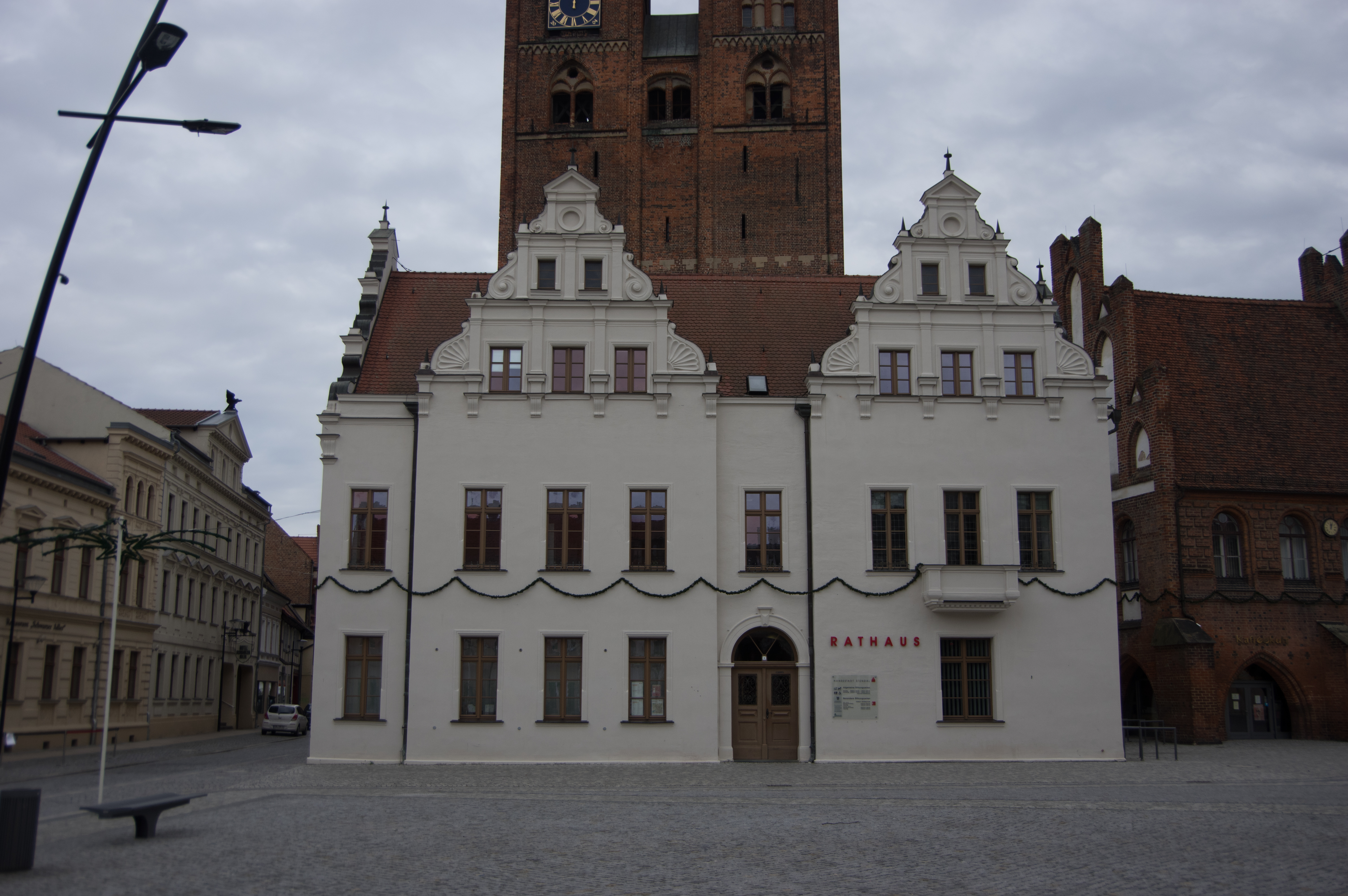 Stendal in Sachsen-Anhalt. Das Rathaus steht unter Denkmalschutz.